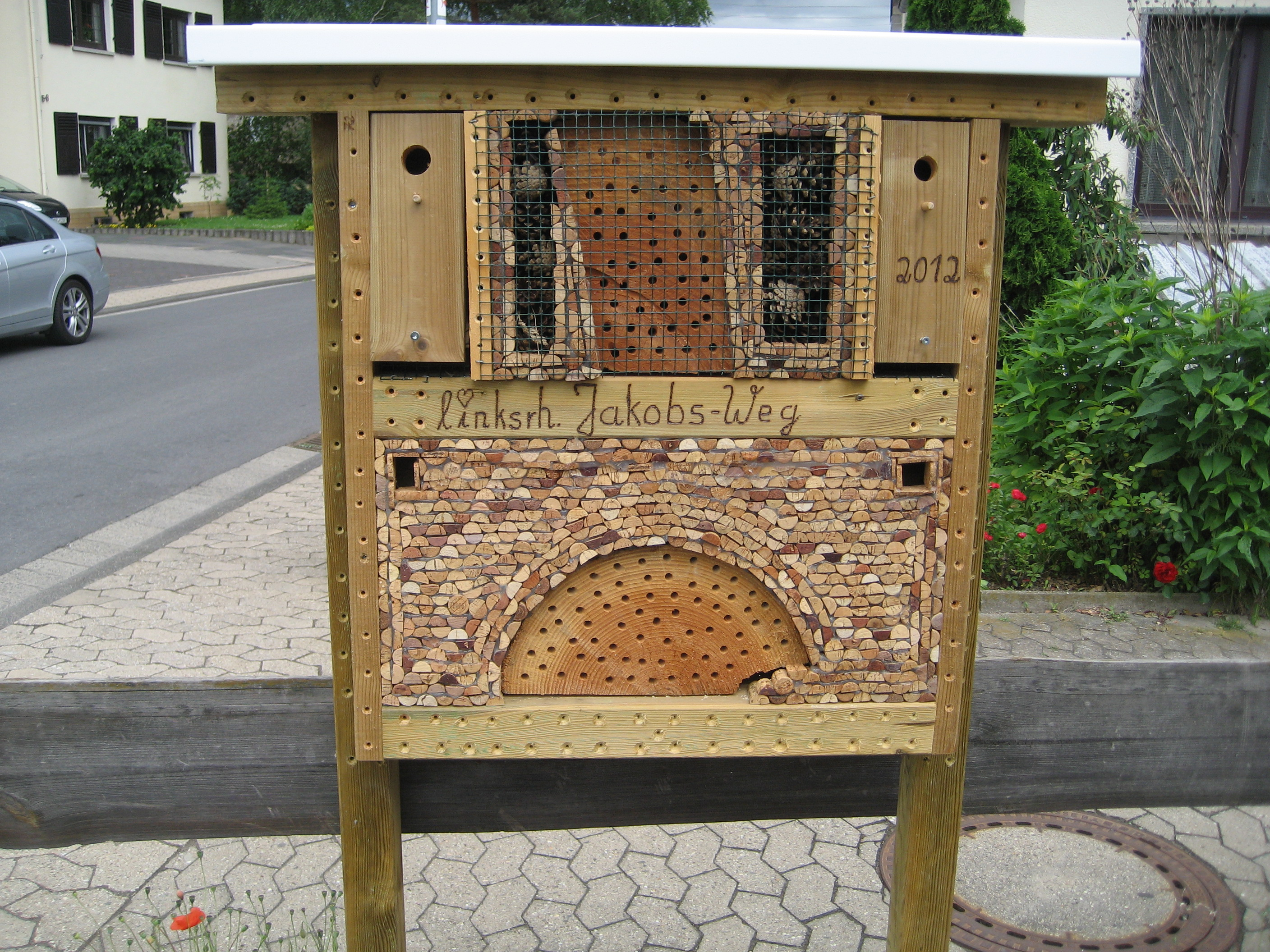 Insektenhotel